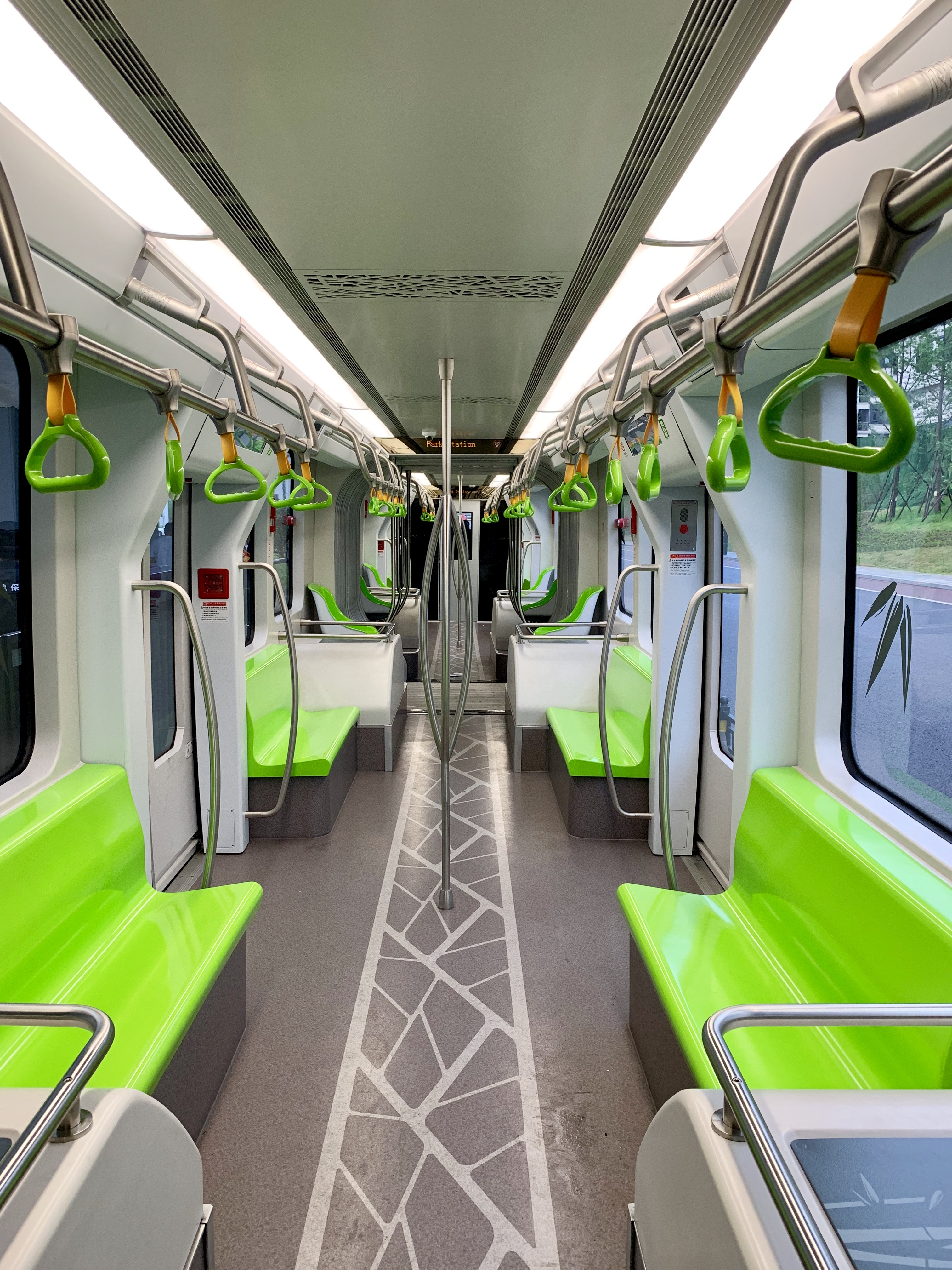 宜宾智轨系统